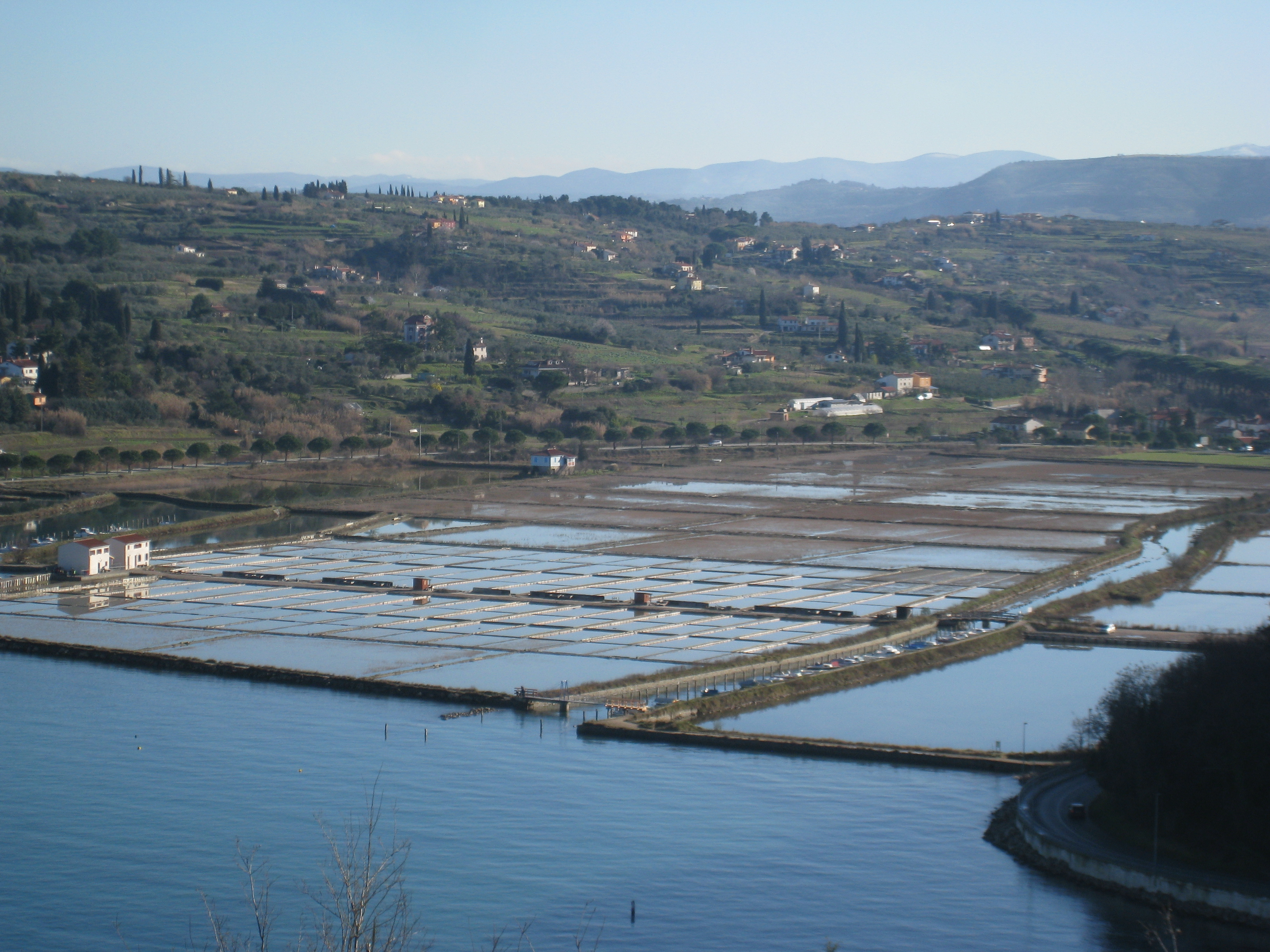 Slovenija - Panorama strunjanskih solin posneta iz okoliških gričev